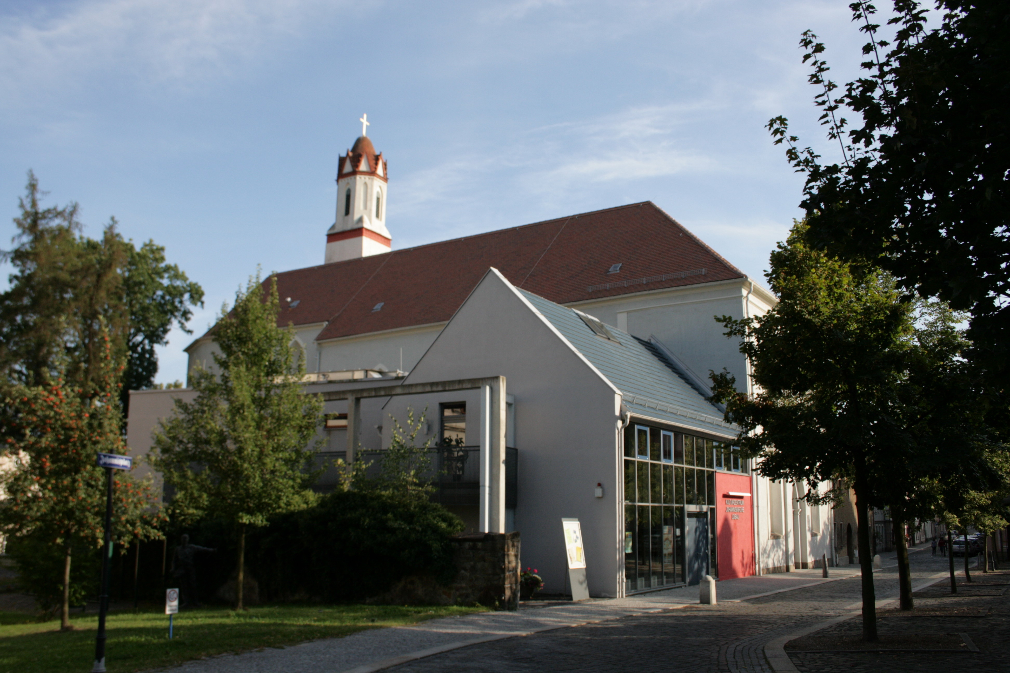 Johanniskirche, Johannisplatz/Johannisstraße in Löbau